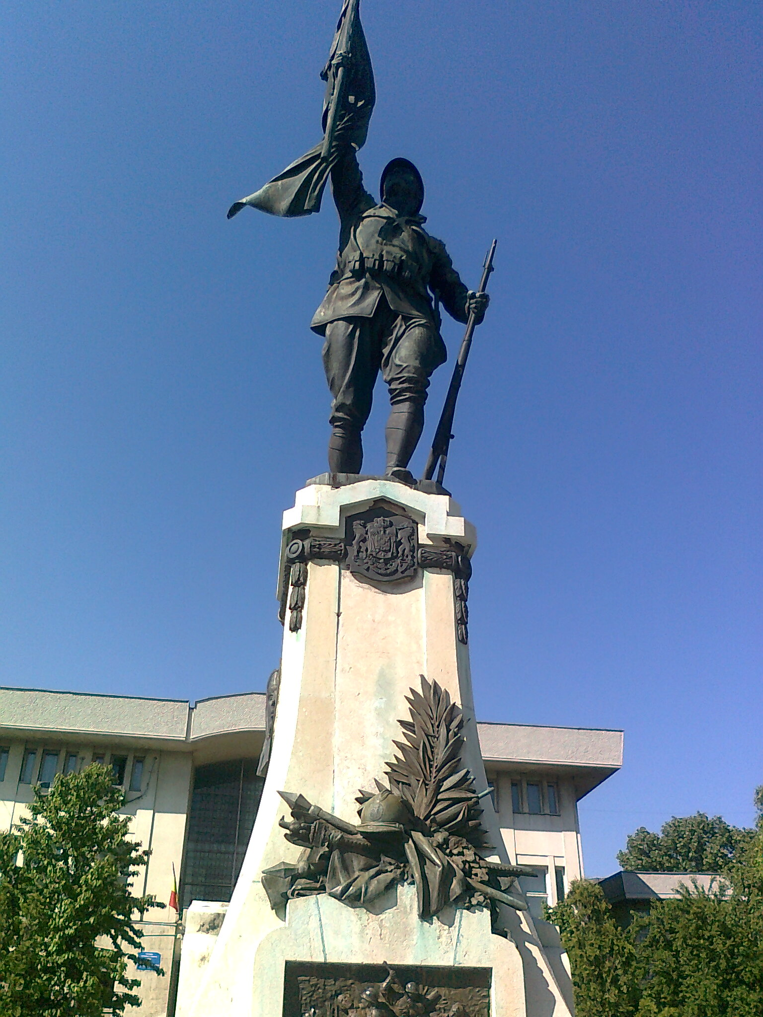 Monumentul eroilor, Alexandria, România